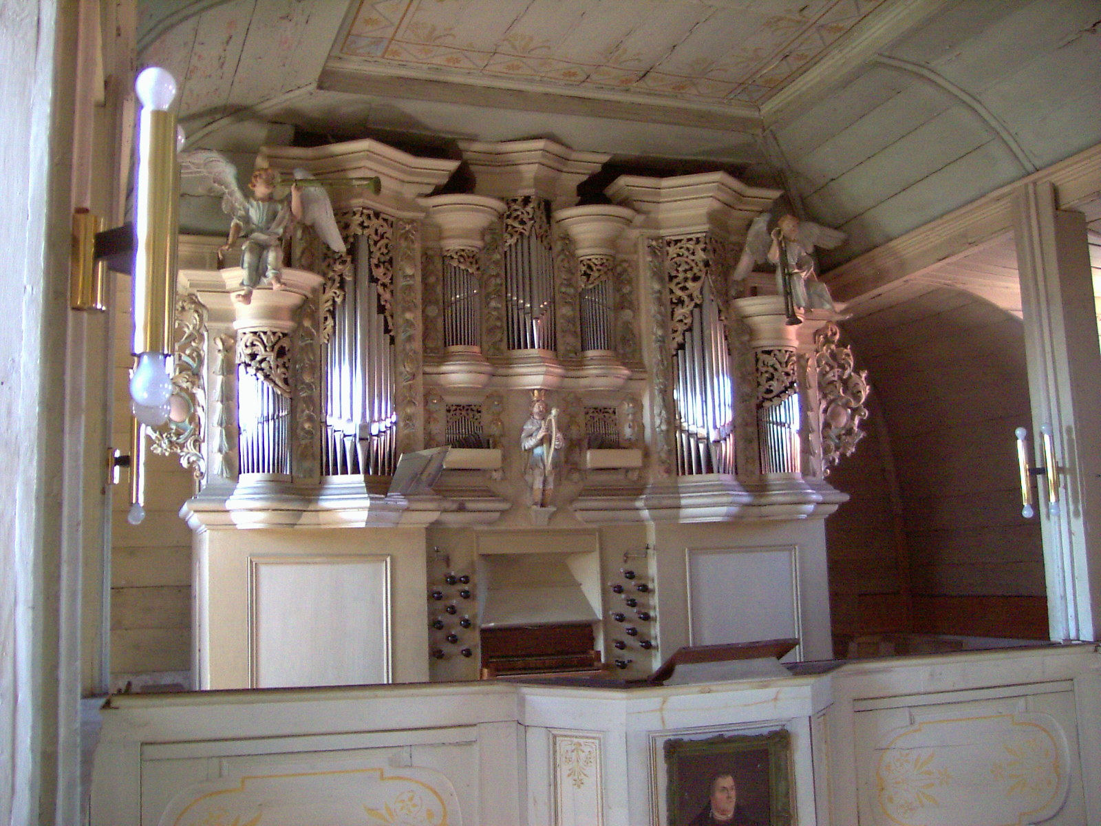 Klettbach